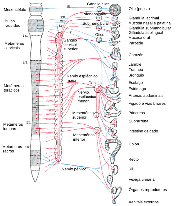 Versión galega do File:Gray839-it.png